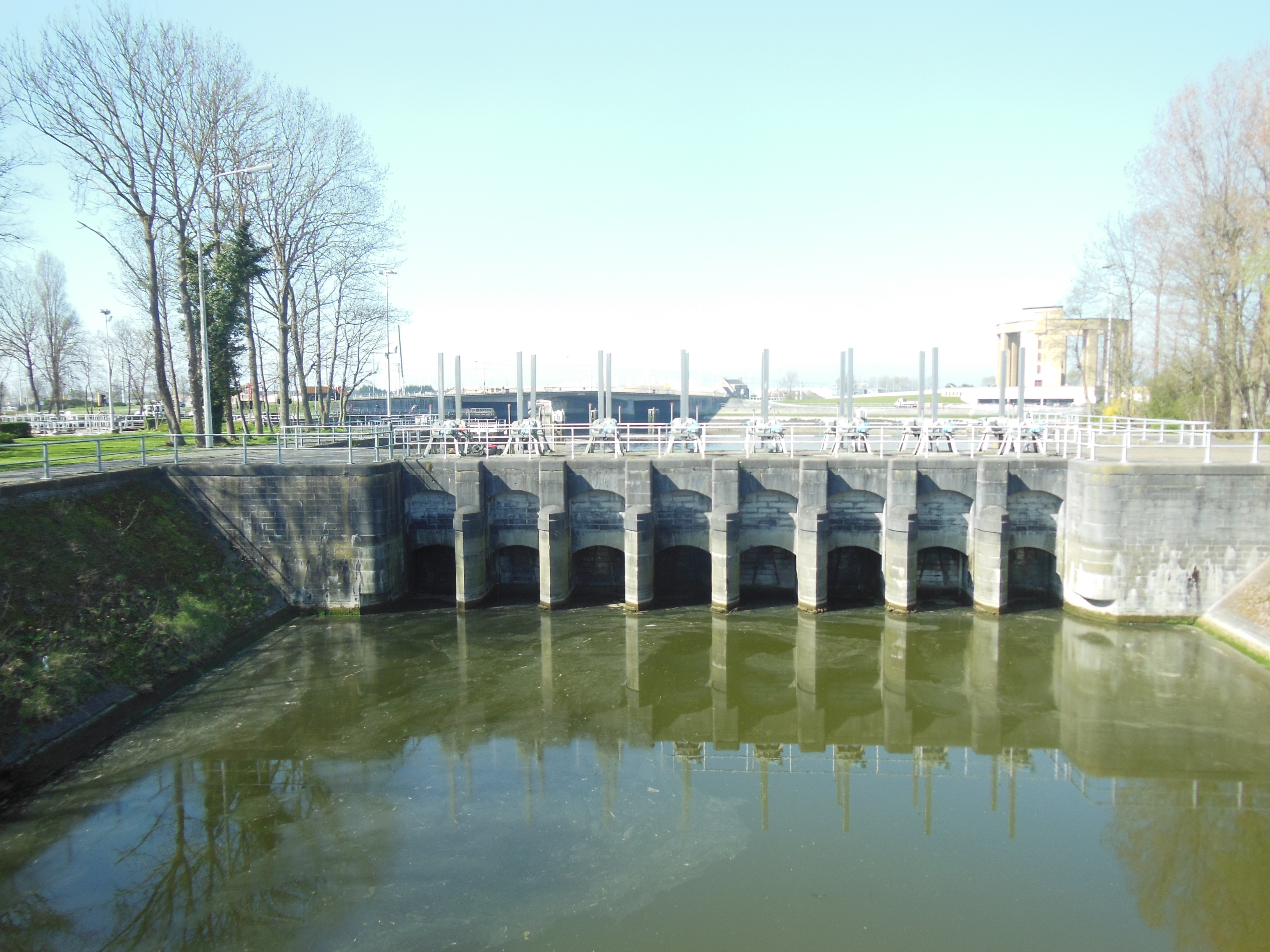 Frontaal zicht op de Veurne Ambacht overlaat, richting achterhaven